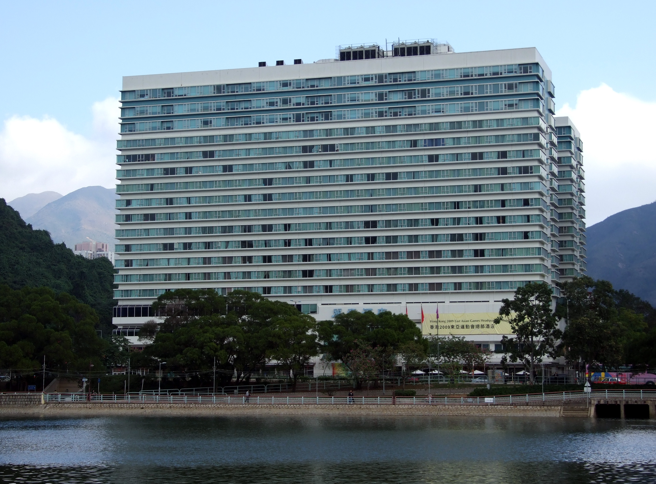 中文（香港）: 東亞運總部酒店麗豪酒店